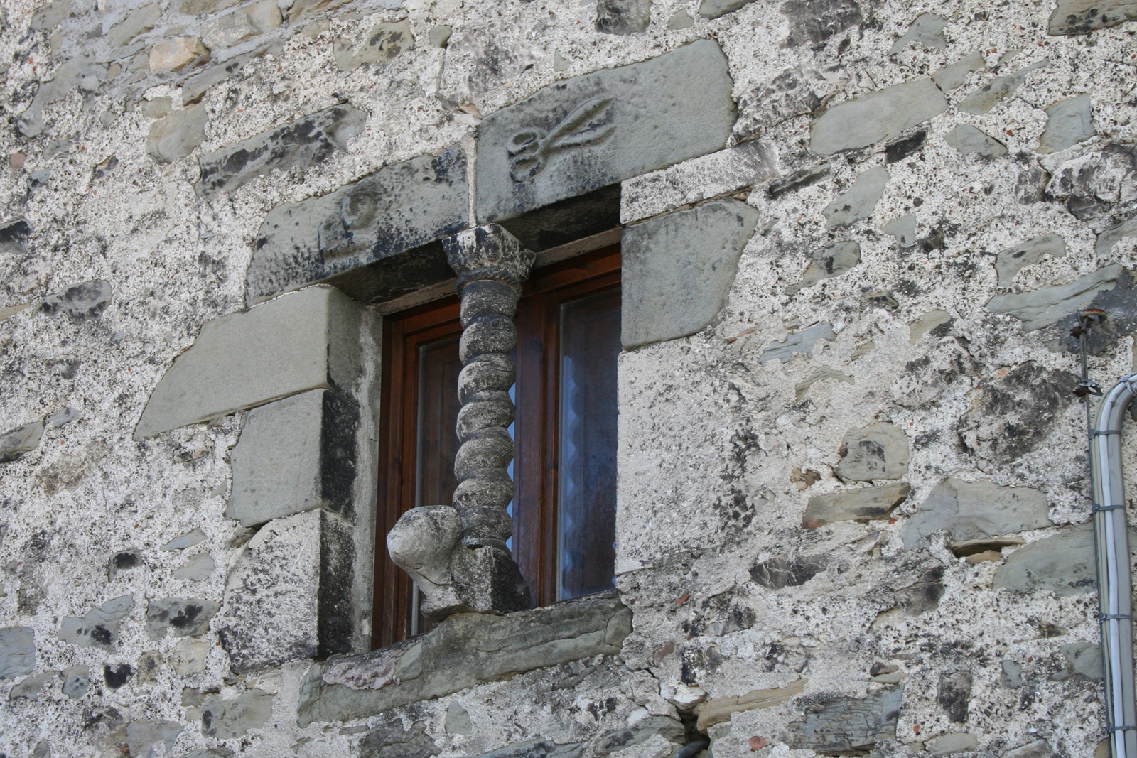 Pietracamela in provincia di Teramo. Bifora del 1400 sulla facciata della casa de “Li Signuritte”. Interno del paese.